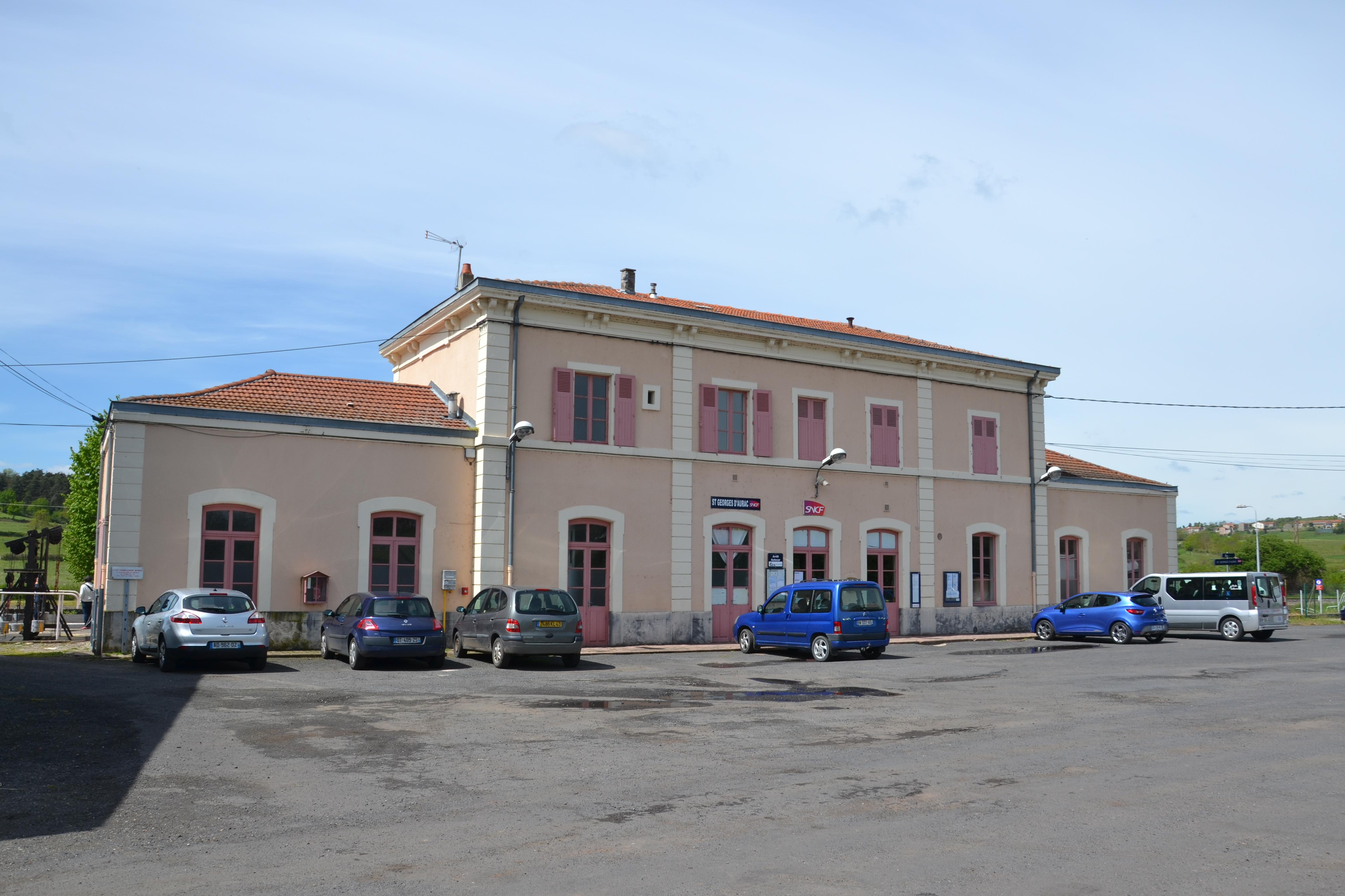 Gare St Georges d'Aurac Parvis